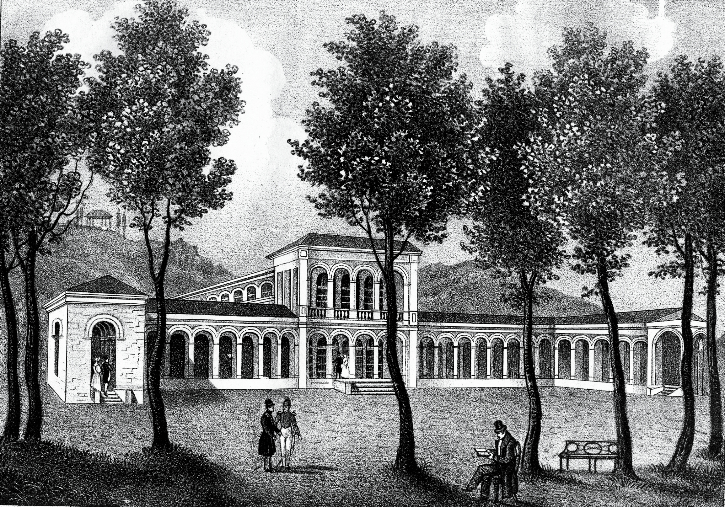 Der noch dreiflügelige Arkadenbau in Bad Kissingen nach seiner Fertigstellung im Jahr 1838